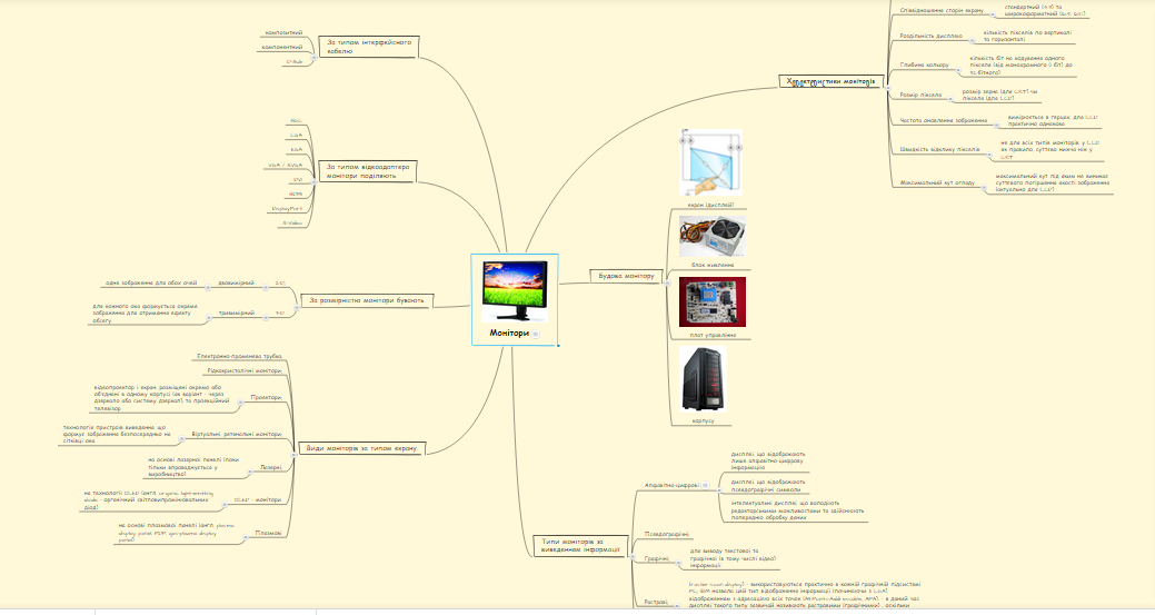 Ментальні карти з використанням онлайн-сервісу Mindmeister 05052015